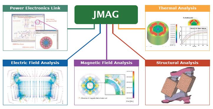 Logiciel JMAG